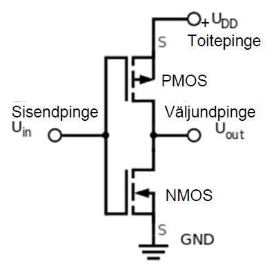 See on CMOS-struktuuri üldskeem